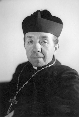 Отец Лукиан Шамбо, будущий архимандрит Дионисий. Стал православным вместе с архимандритом Иринеем (Виннартом), приемник последнего в качестве главы правосланой общины западного обряда и настоятеля Вознесенского прихода. После кончины отца Афанасия в 1944 г., стал монахом под именем Дионисий, основал монастырь западного обряда свв. Дионисия и Серафима, которого был назначен настоятелем в 1955 г.